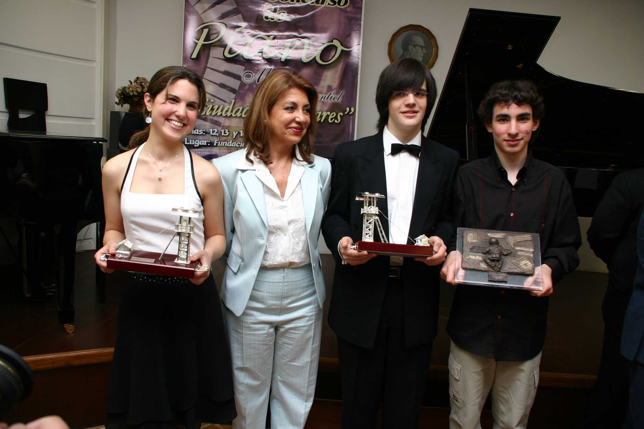 Katia Michel Corcoy y Carlos junto a David, premio a la musicalidad, finalistas juvenil e infantil del XXIV Concurso de Piano Ciudad de Linares "Marisa Montiel" celebrado el pasado 14 de mayo de 2005.